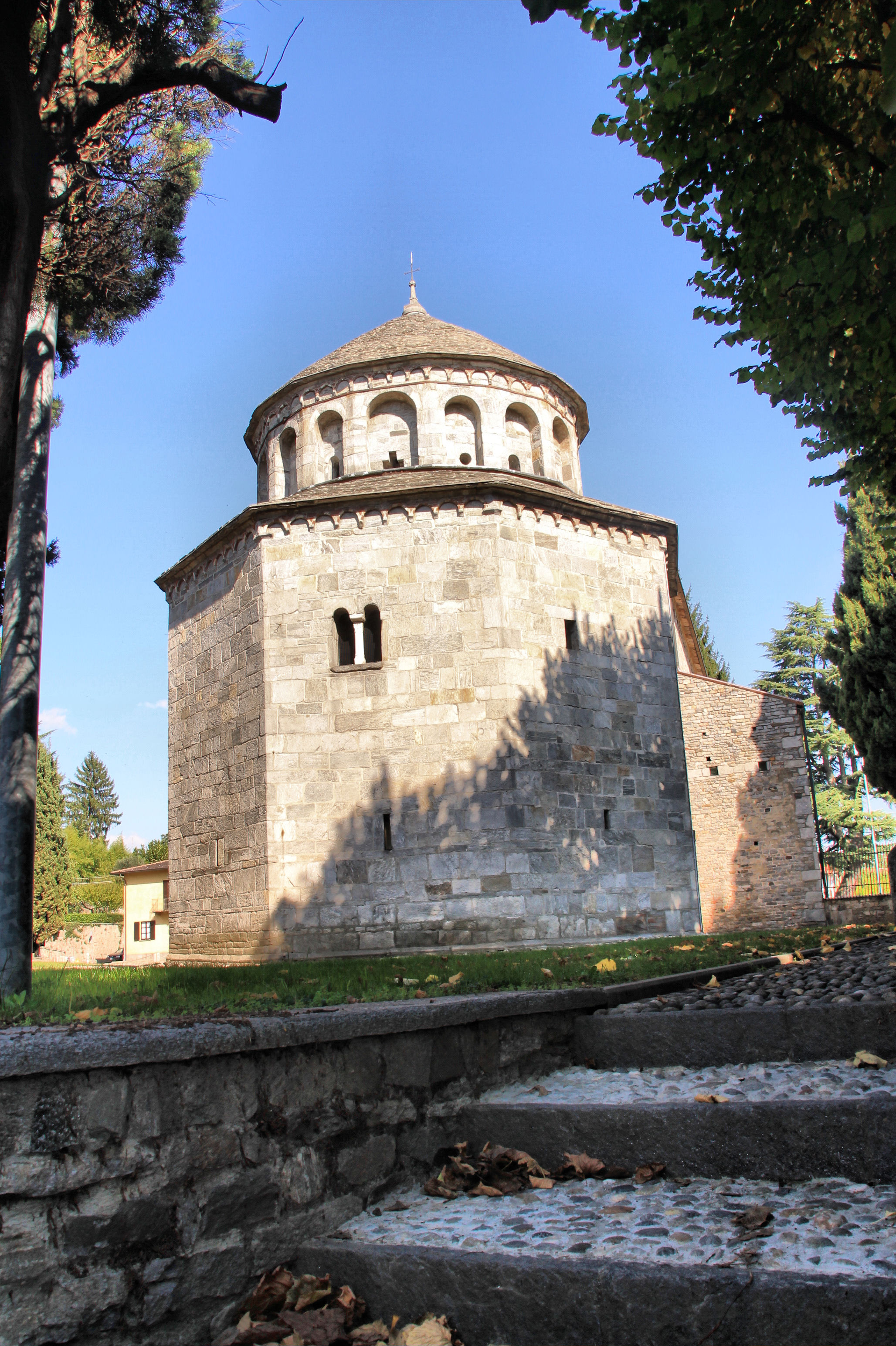 Battistero di San Giovanni This is a photo of a monument which is part of cultural heritage of Italy.